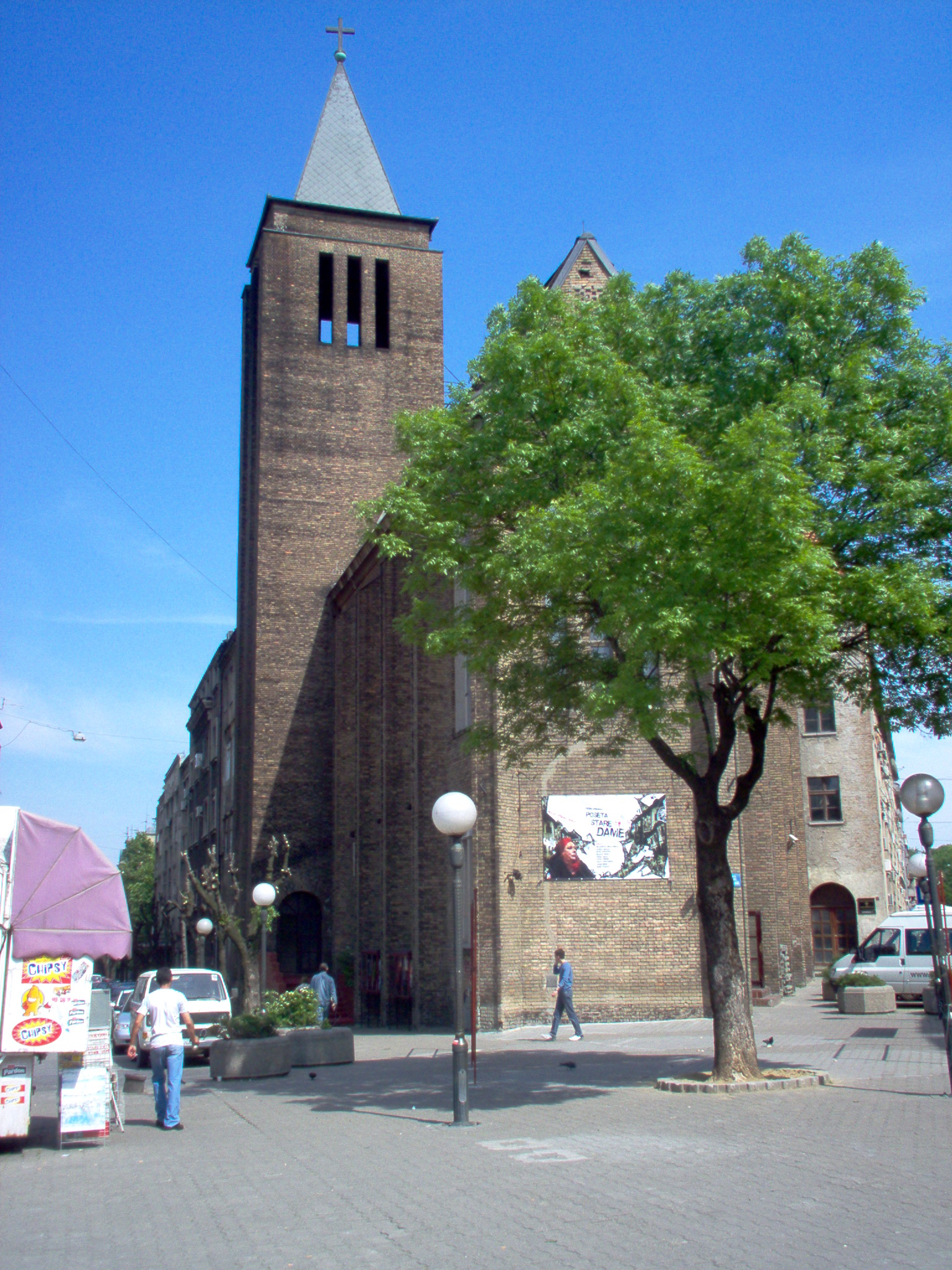 БИТЕФ театар у Београду, код Бајлонијеве пијаце.